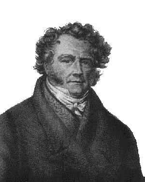 Eugène-François Vidocq (1775-1857)